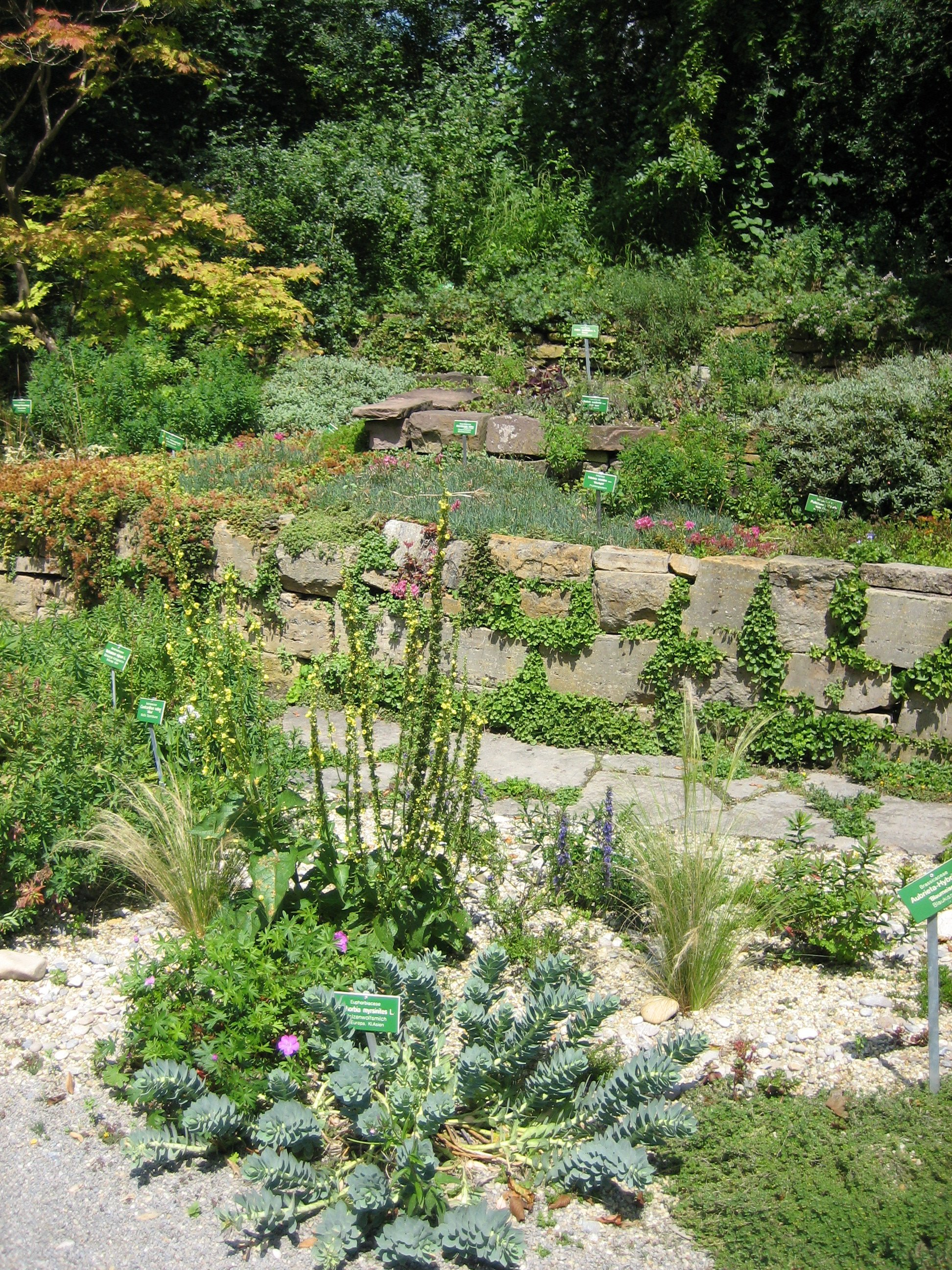 Botanischer Garten in Augsburg, Pflanzen des Alpinumbereichs